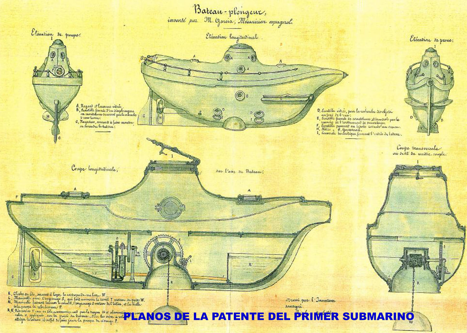 Planos de la patente del submarino diseñado y construido por Cosme García Sáez